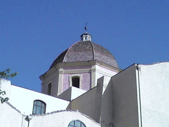 Immagine raffigurante la Cupola della Basilica di Sant'Elena scattata il 17 settembre 2007 con cellulare Samsung SGH-Z230 e modificata con ACDSee8 (Cambio luminosità etc.)